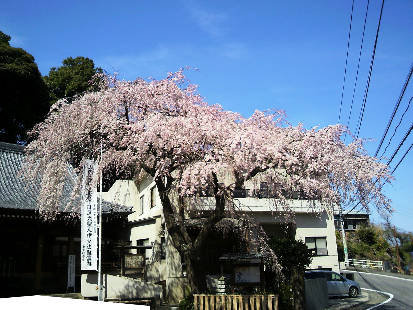 舩守山 蓮慶寺 しだれ桜